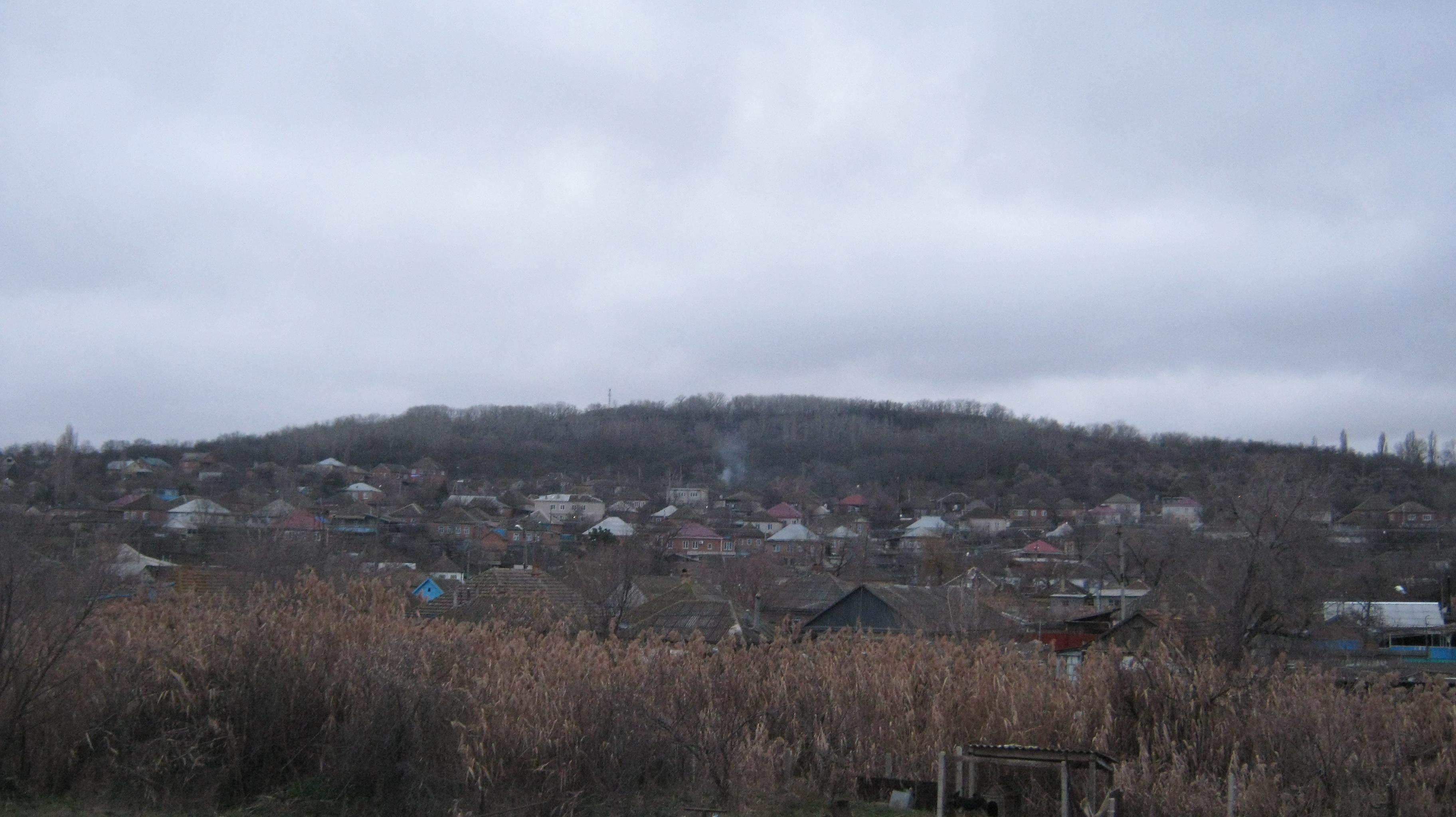 гора Куцай